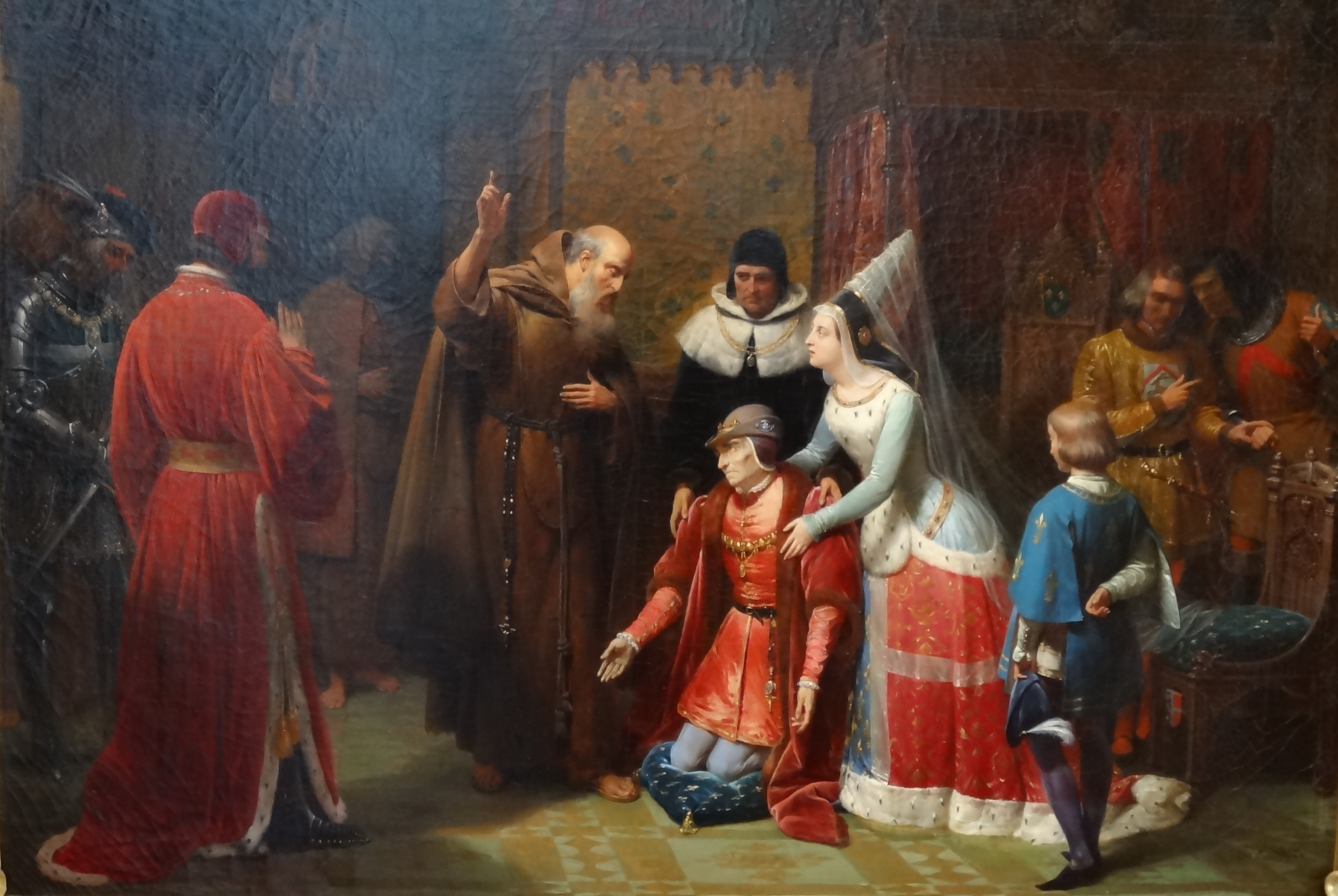 На картине изображен Людовик XI, 01 мая 1483 года, преклонивший колени перед святым Франциском с просьбой об исцелении.